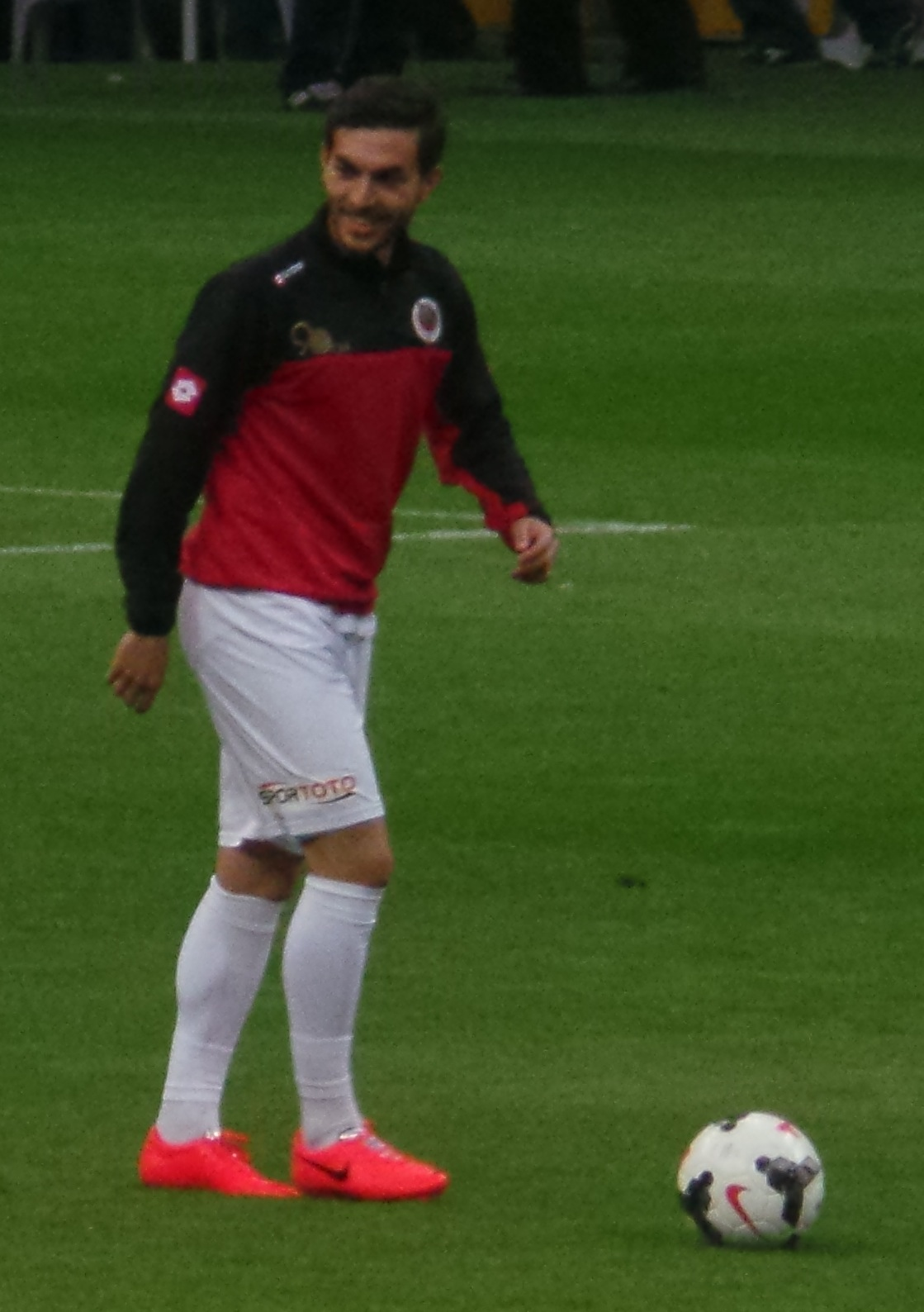 Yusuf Emre Gültekin